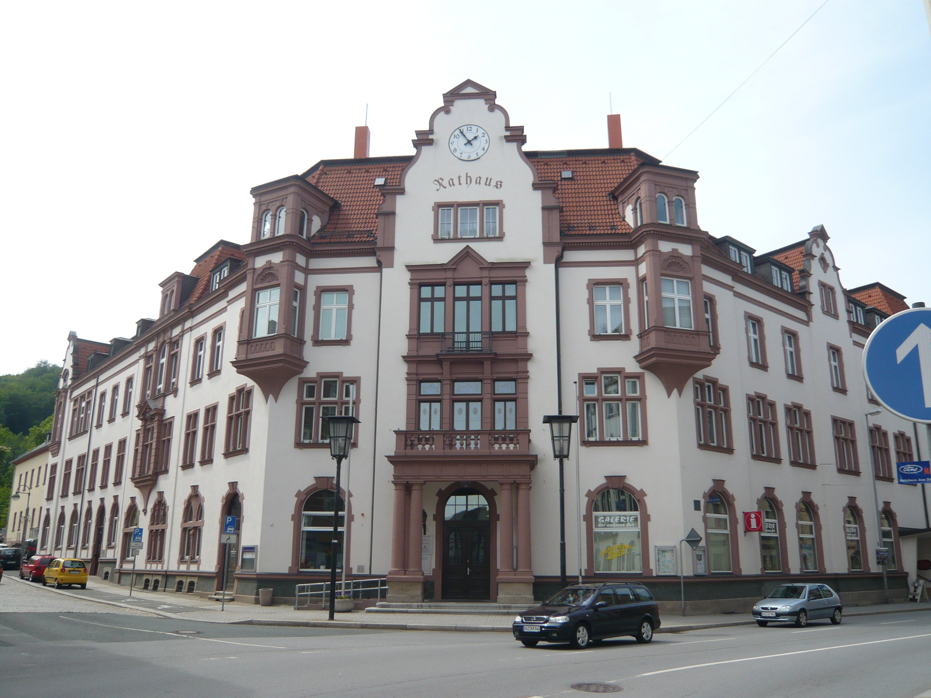 Stadt Aue, Rathaus